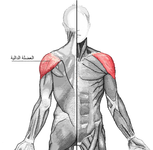 Deltoid muscle